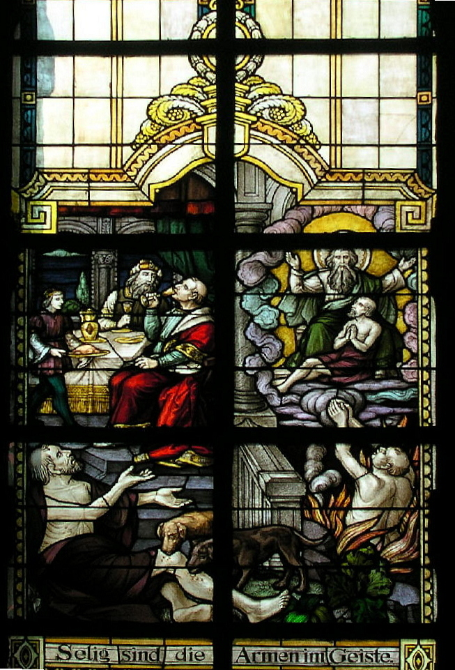 Trittenheim an der Mosel, Bleiglasfenster im Nazarenerstil (1923) in der katholischen Pfarrkirche "St. Clemens" Matthäus 5,3: 3 Selig, die arm sind vor Gott; denn ihnen gehört das Himmelreich. Aus den Jahren 1920/21 stammen die größtenteils noch originalen neoromanisch gehaltenen Glasfenster der Firmen Gassen & Blaschke (Düsseldorf; 1., 2., 4. und 6. Seligpreisung)